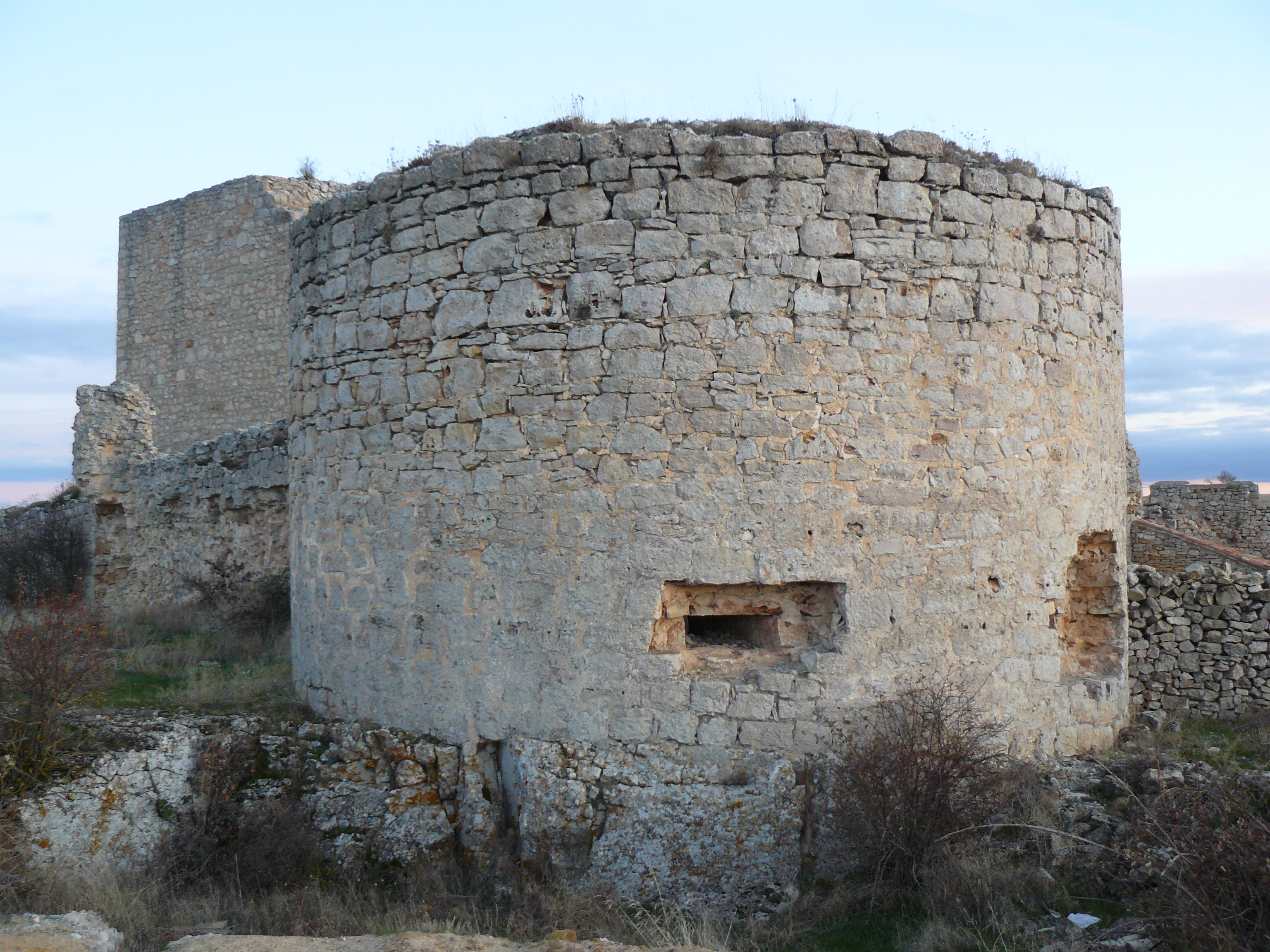 Rello, Soria.